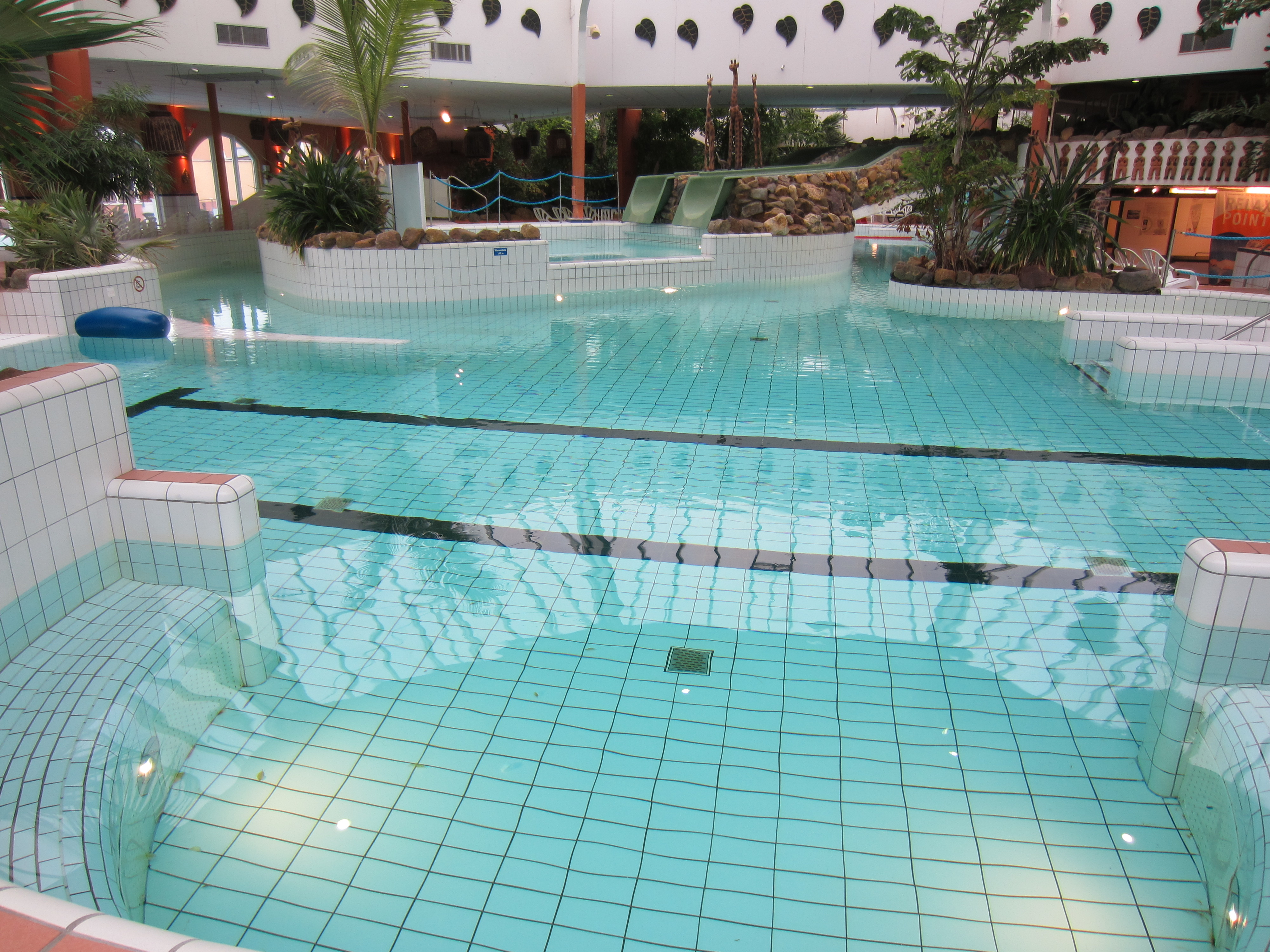 Aqua Mundo linkerzijde met glijbanen